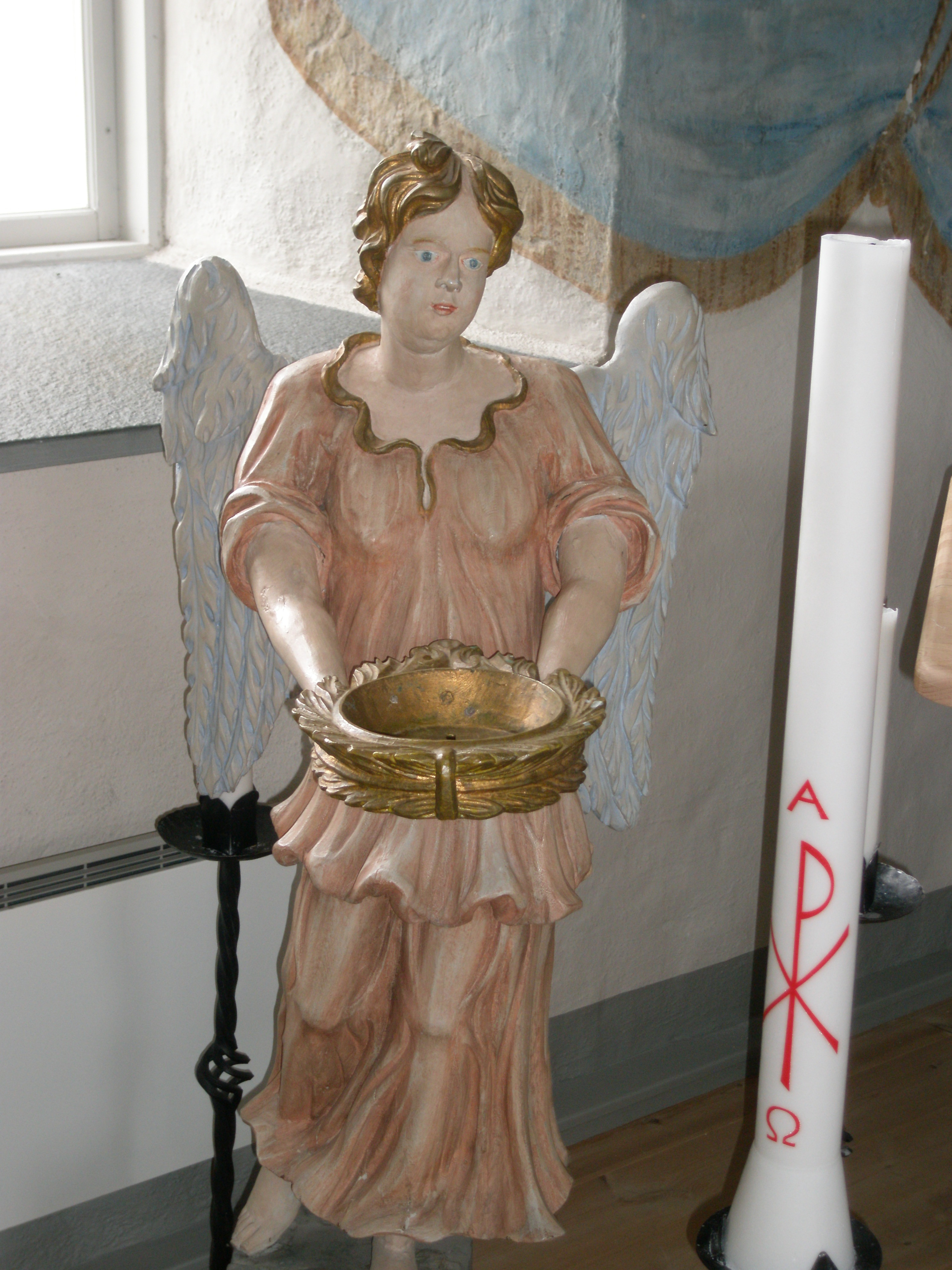 Interiör (dopängel) från Offerdals kyrka i Ede, Offerdals socken, Krokoms kommun, Jämtland, Sverige.